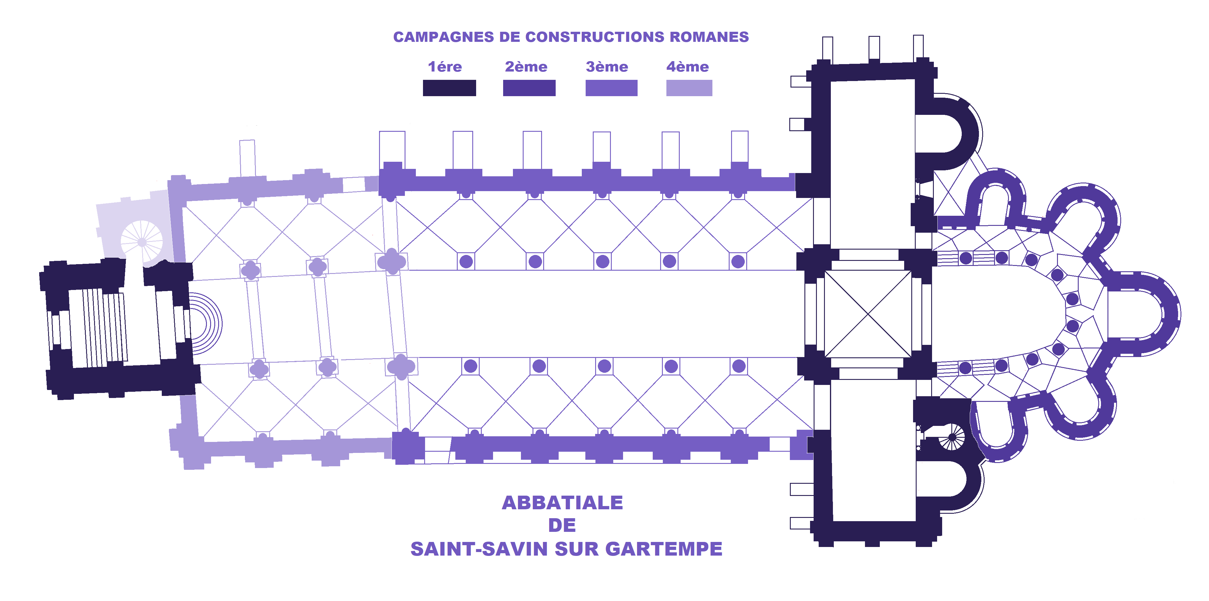 Abbatiale de Saint-Savin-sur-Gartempe, plan